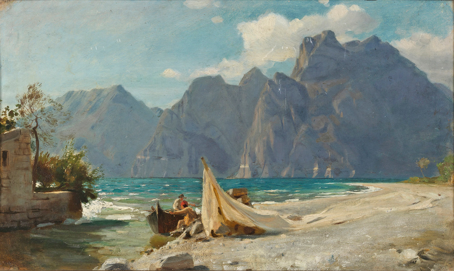 Italienische Fischer an der Küste. Öl auf Malkarton. Verso altes Etikett mit Künstler-Bezeichnung; 32 cm x 51,5 cm